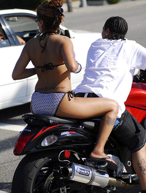 Black Bike Week Festival 2008